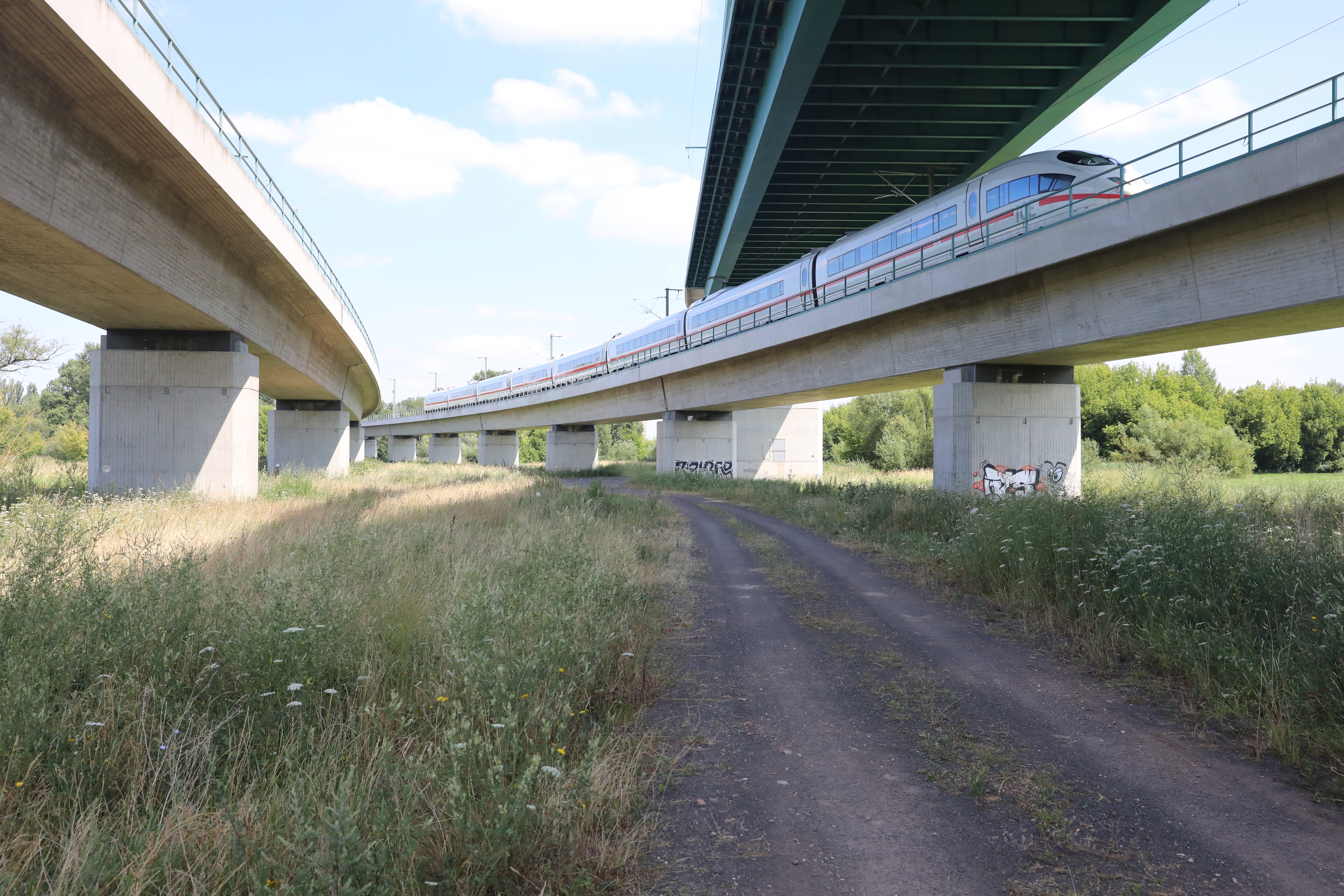 Saale-Elster-Talbrücke